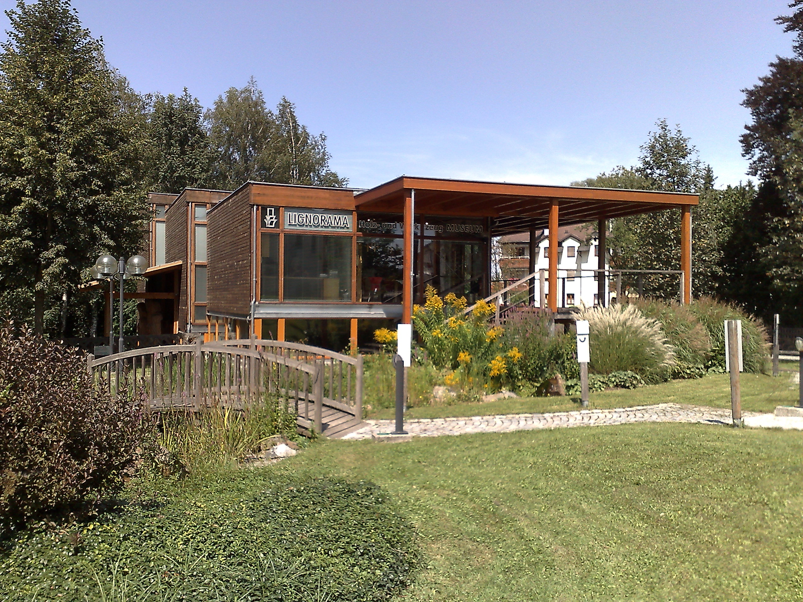 Museum Lignorama in Riedau; ehemaliges Österreich-Haus der Winterolympiade 1998